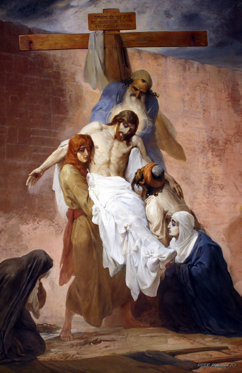 Картина «Снятие с Креста» на Александровском подворье в Иерусалиме.